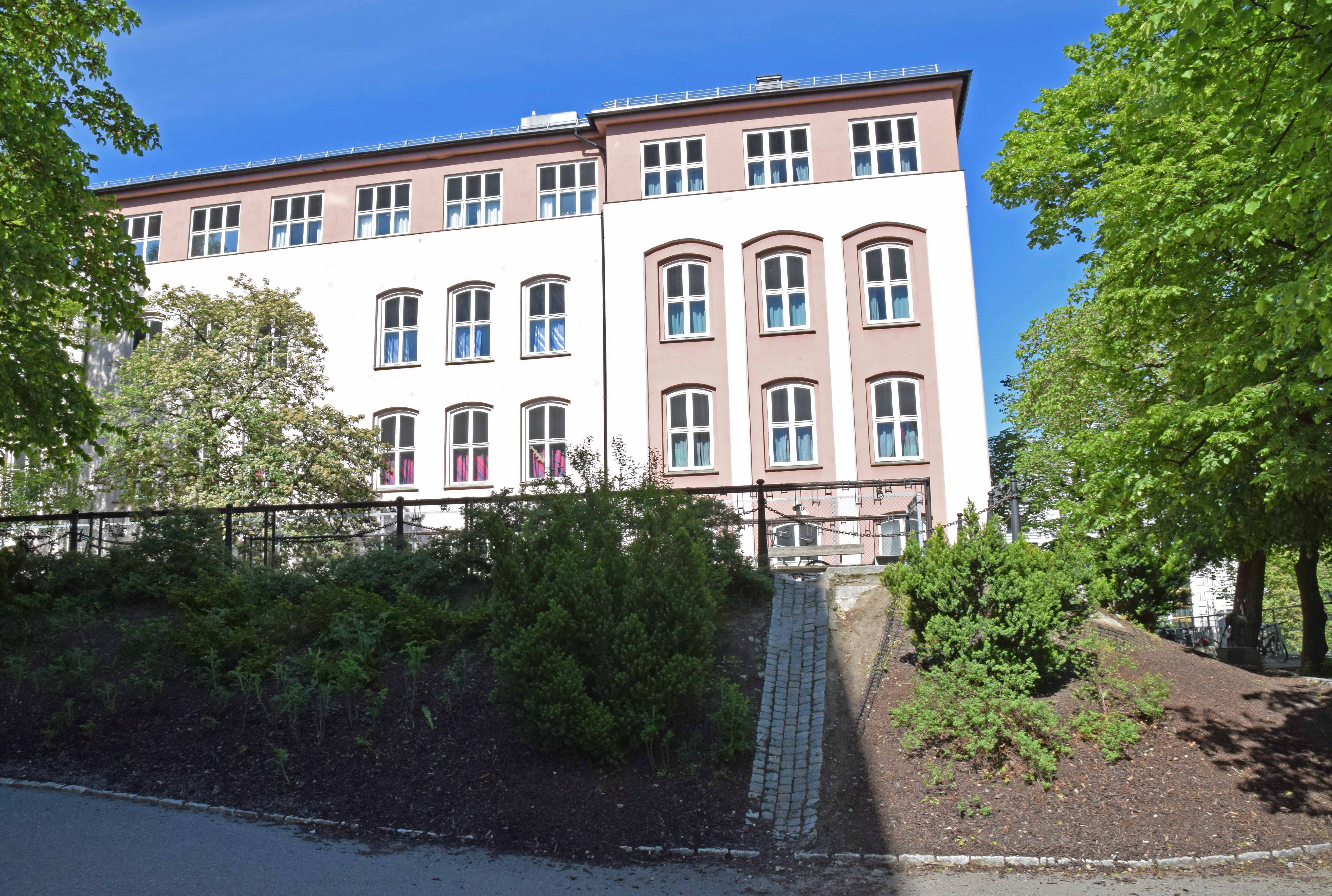 Ruseløkka skole sett fra Cort Adelers gate